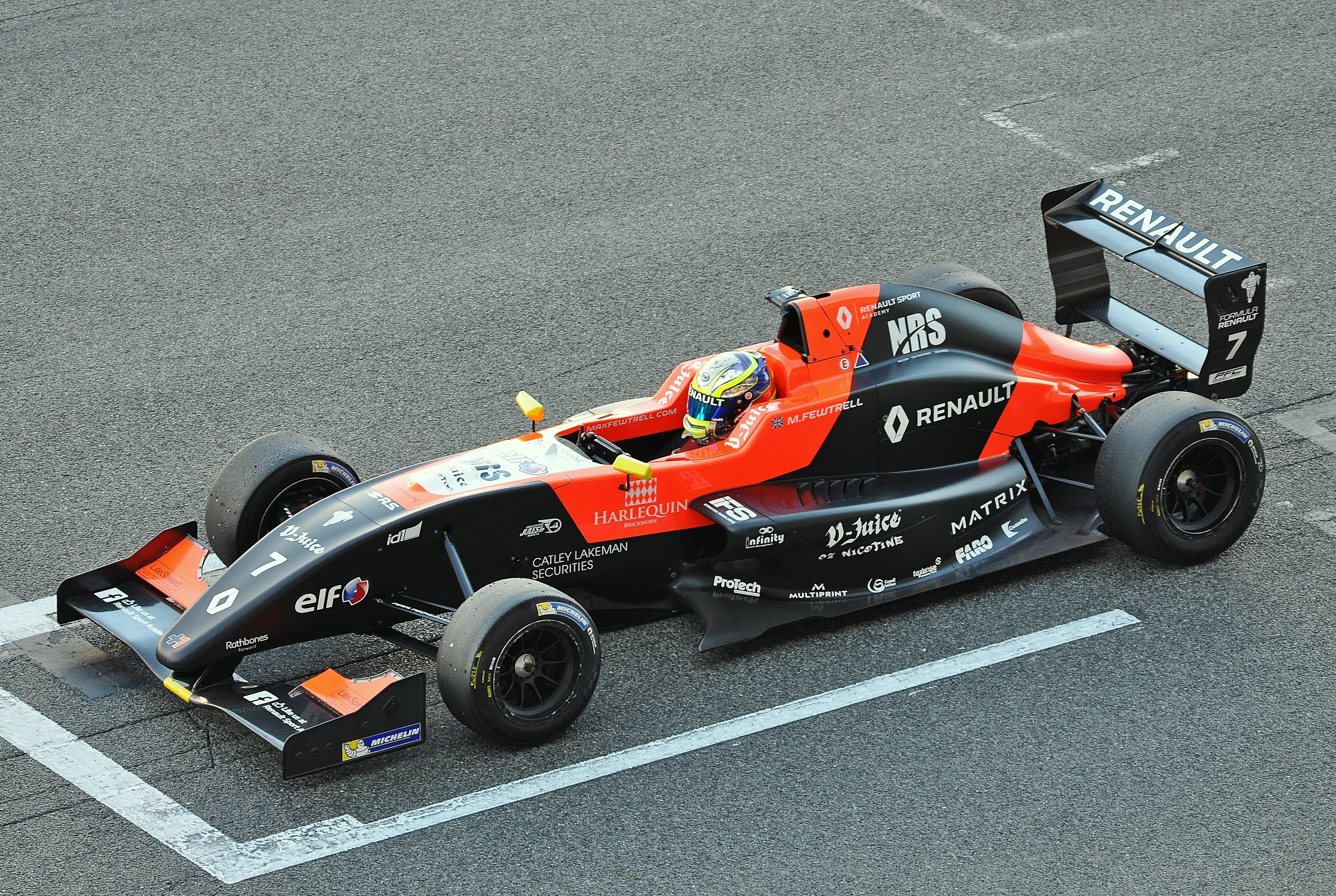 Circuito de Barcelona 2017